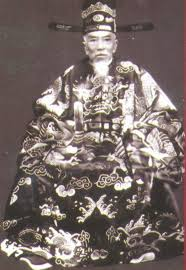 Đông các Đại học sĩ Trương Quốc Dụng (1797-1864)